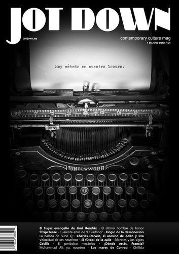 Jot Down nº1 especial aniversario. Primera edición.